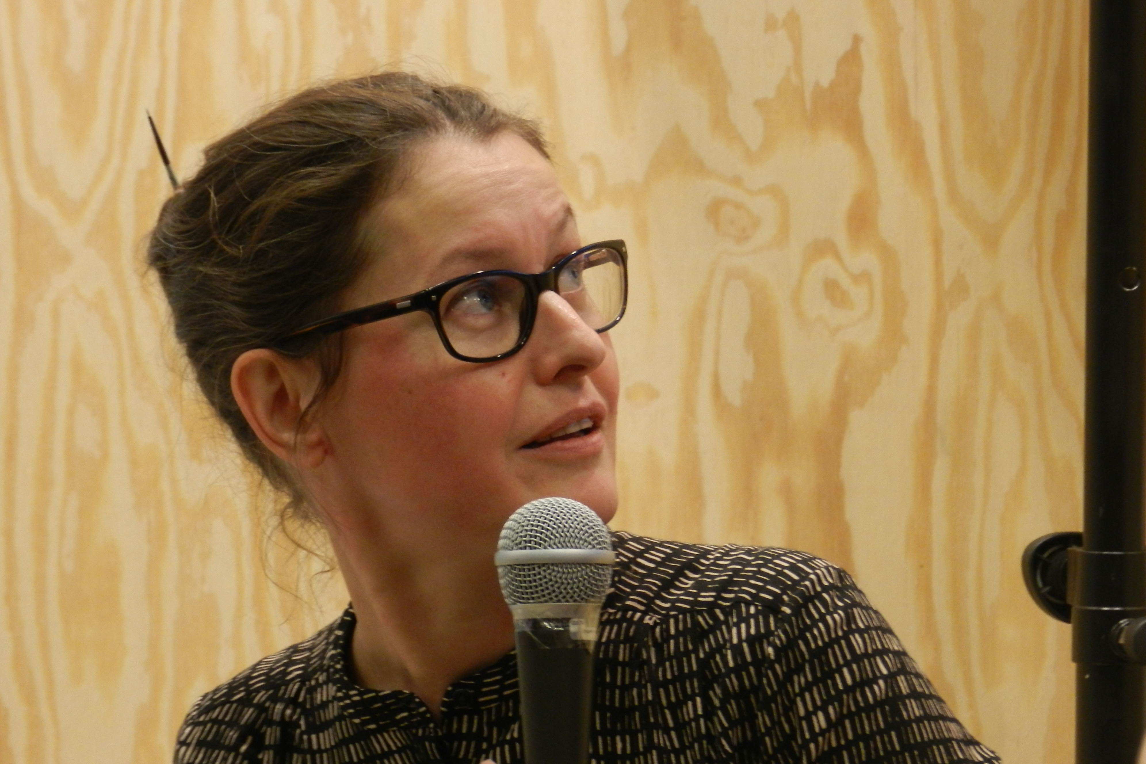 Katarina Strömgård på Bokmässan i Göteborg 2018.